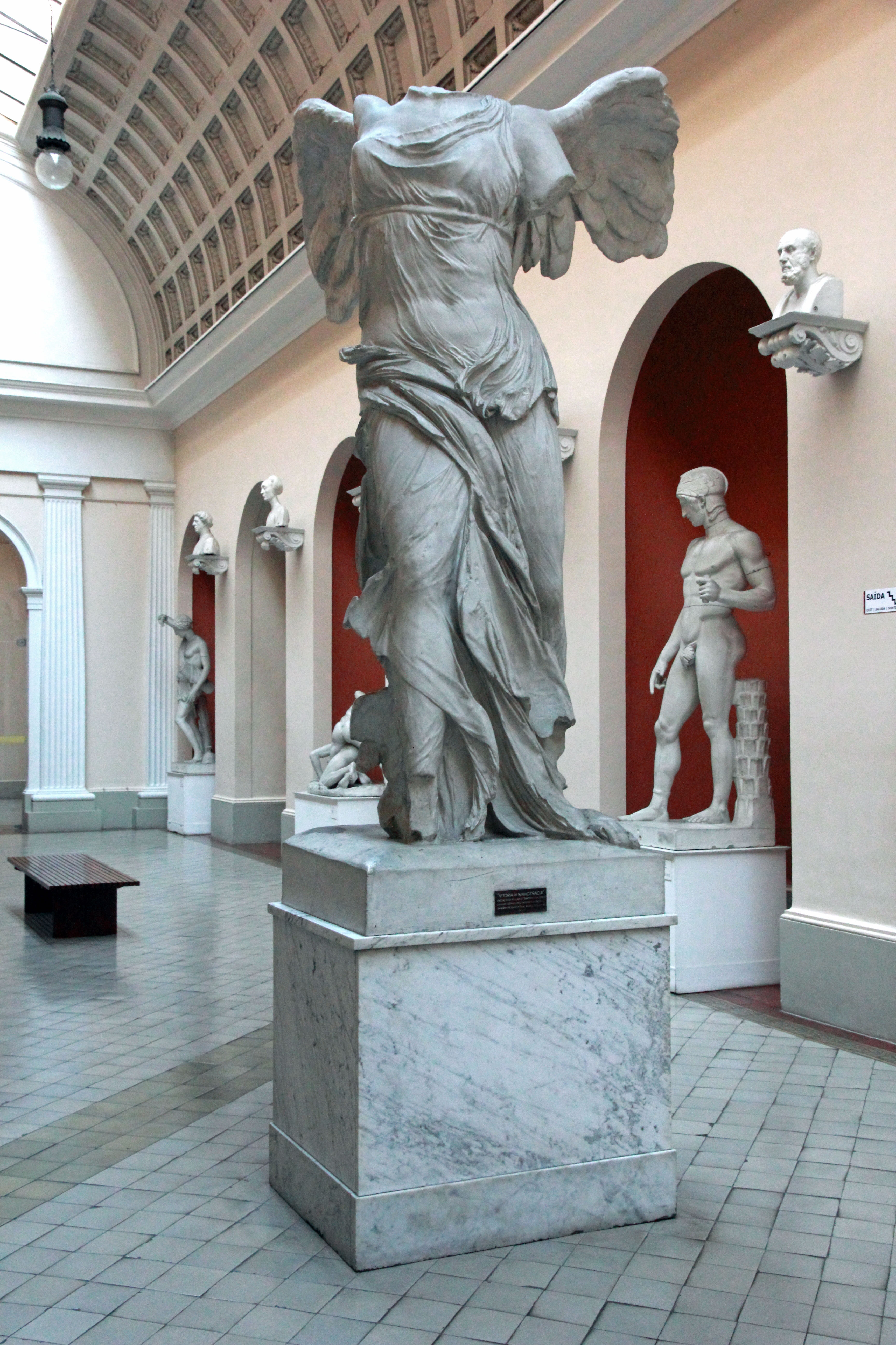 Escultura Vitória de Samotracia no Museu Nacional de Belas Artes